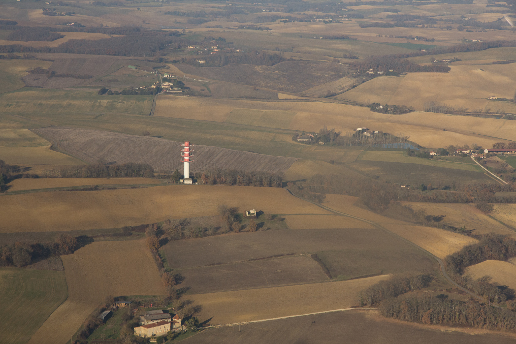 Vue aérienne de la tour de télécommunication e la Sauvetat